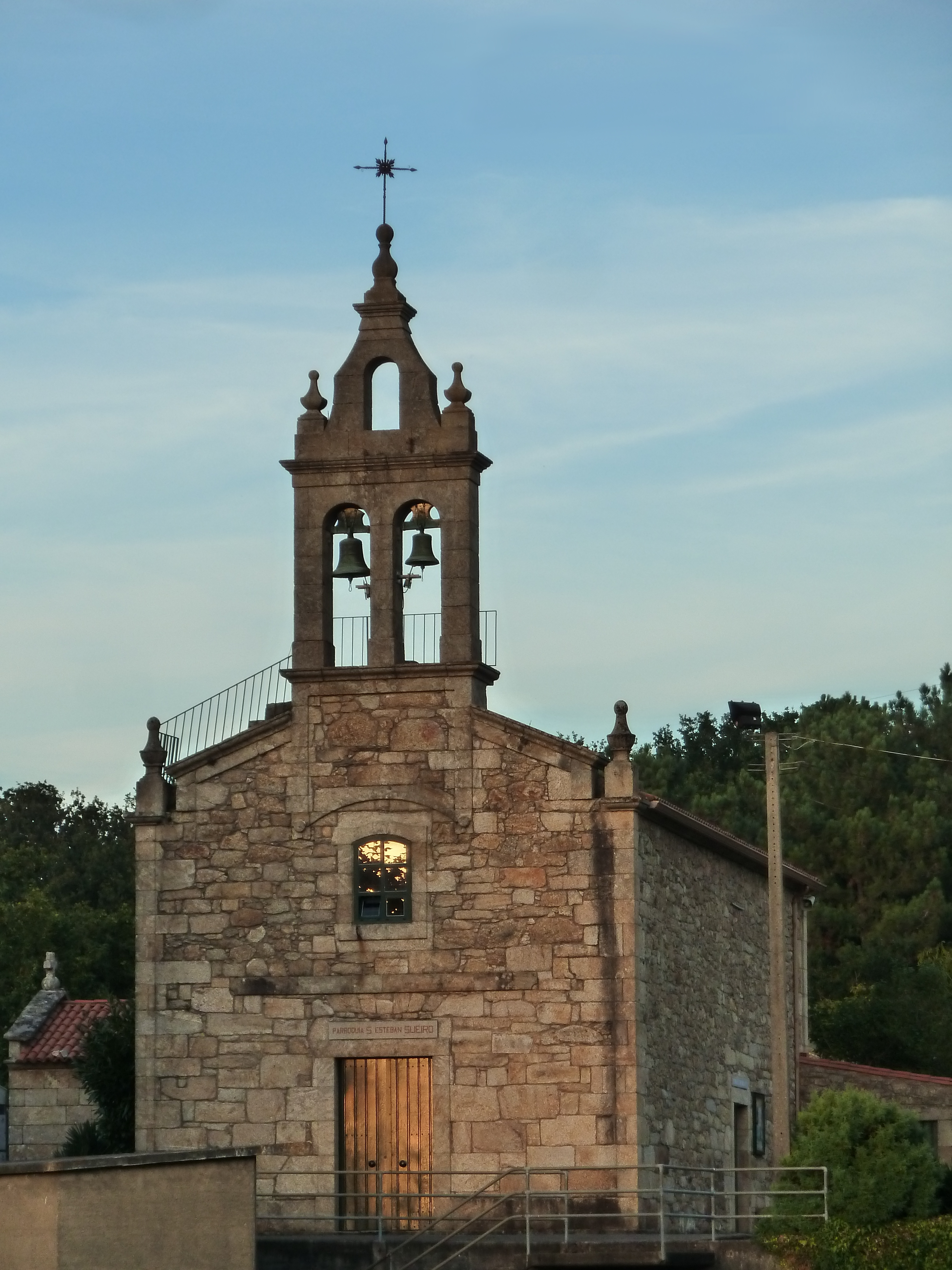 Igrexa San Estebo Sueiro, Culleredo.